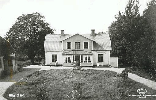 Älta gårds gamla huvudbyggnad (riven 1934)